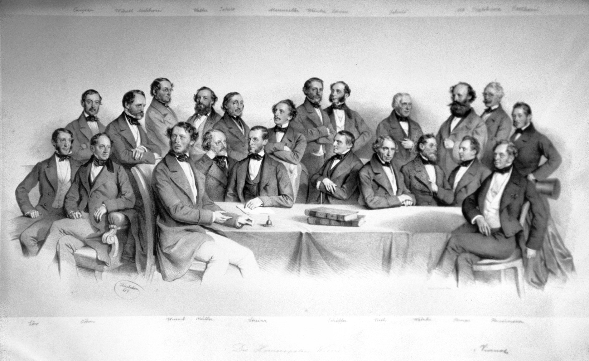 Gruppenbild mit folgenden Personen: Arnold Loewe, Johann Böhm, Franz Wurmb, J. O. Müller, Wenzel Streinz, Augusrt Schäffer, Johann Emanuel Veith, Philipp August Watzke, Klemens Hampe Hampe, Wilhelm Fleischmann, Caspar, Würstl, Aichhorn, Waller, Tedesco, Mathias Marenzeller, Weinke, Schwarz, Schmid, Franz Karl Alb, Wilhelm Pratobevera, Rothansl. v. Vivenot Lithographie von Josef Kriehuber, 1852